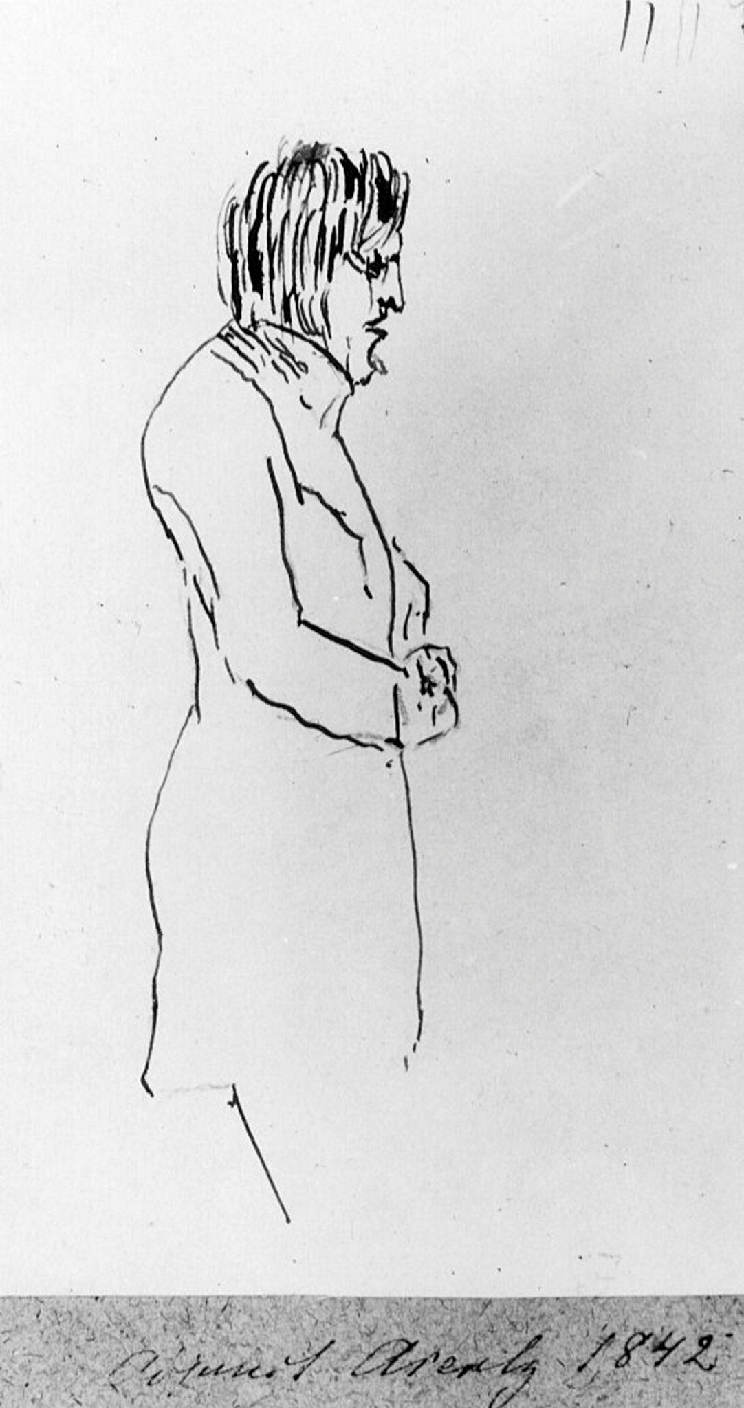 Hans Severin Arentz (1806-1875) tegnet av Gustav Adolph Lammers